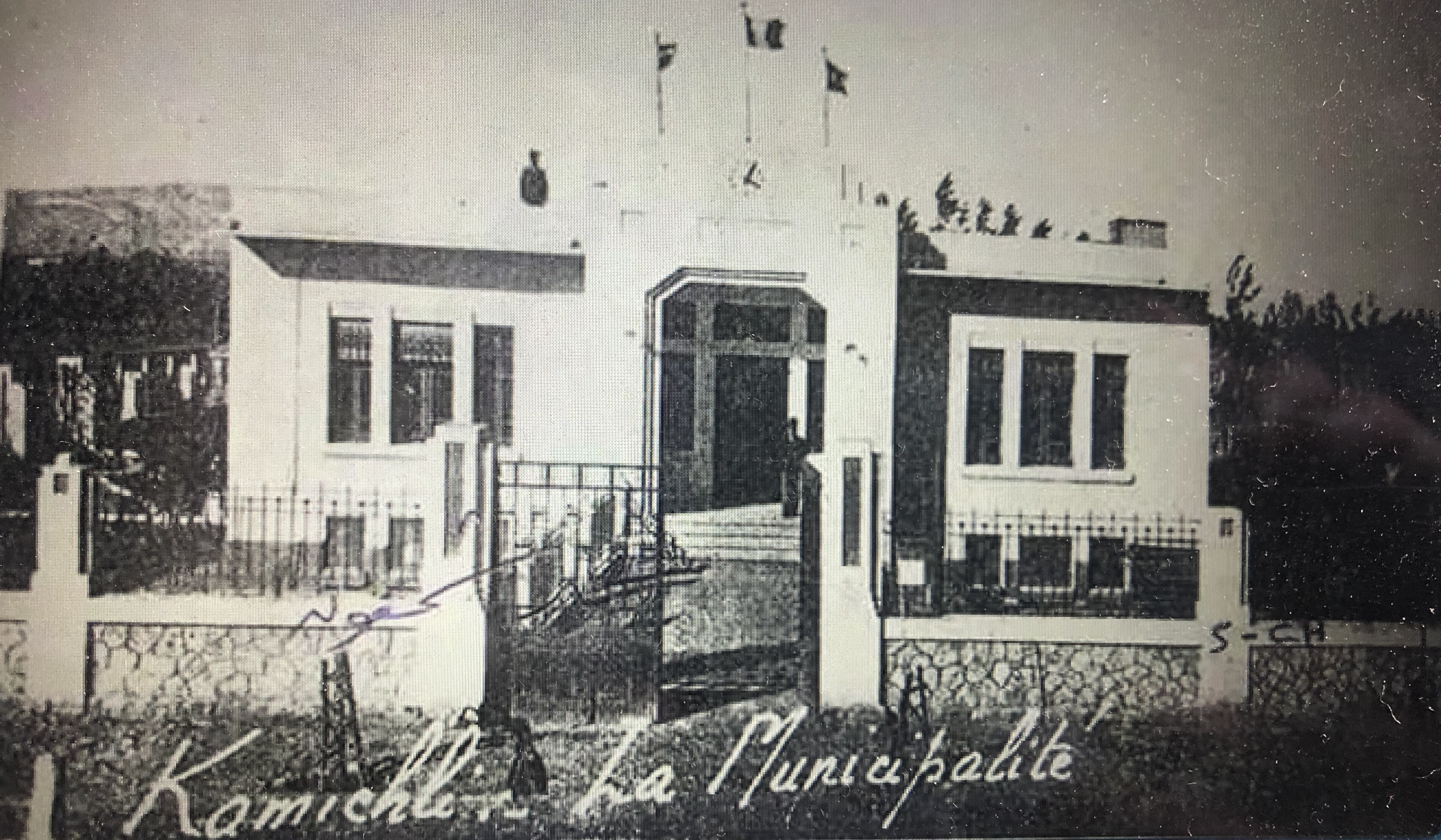 La municipalité historique de Kaméchli